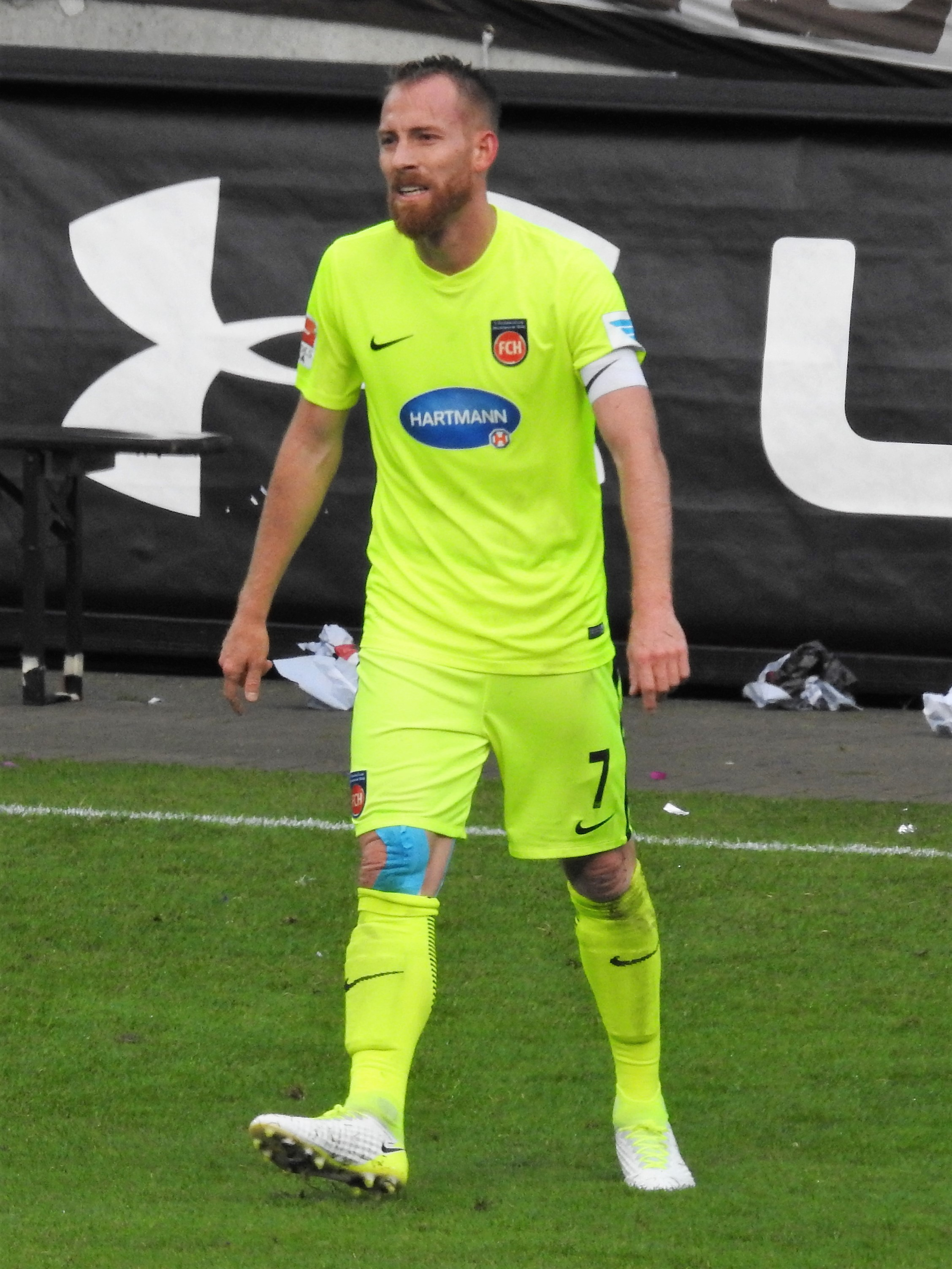 Marc Schatterer 2017